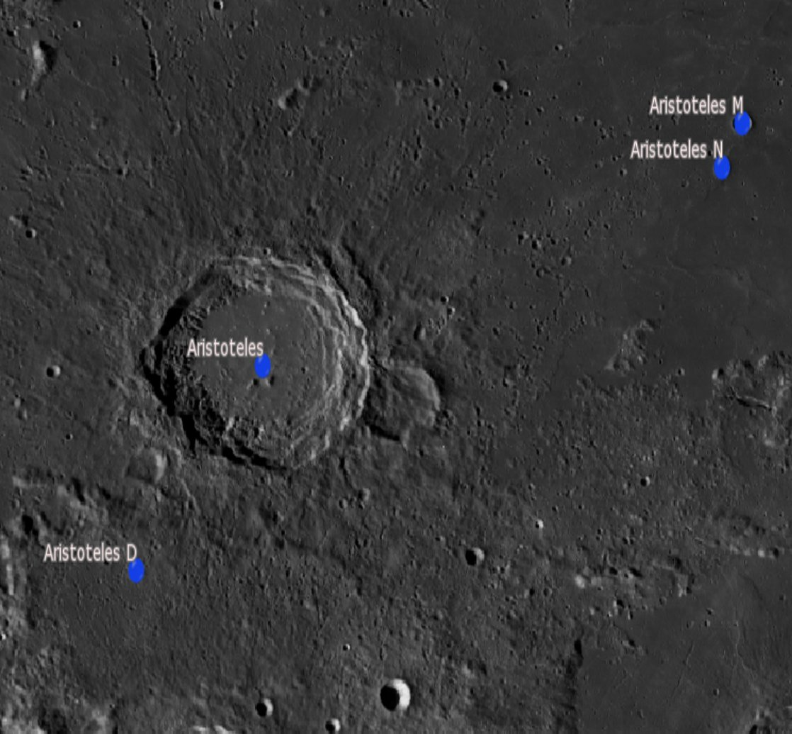 Cráter lunar Aristóteles. Cráteres satélite. (Imagen LRO)